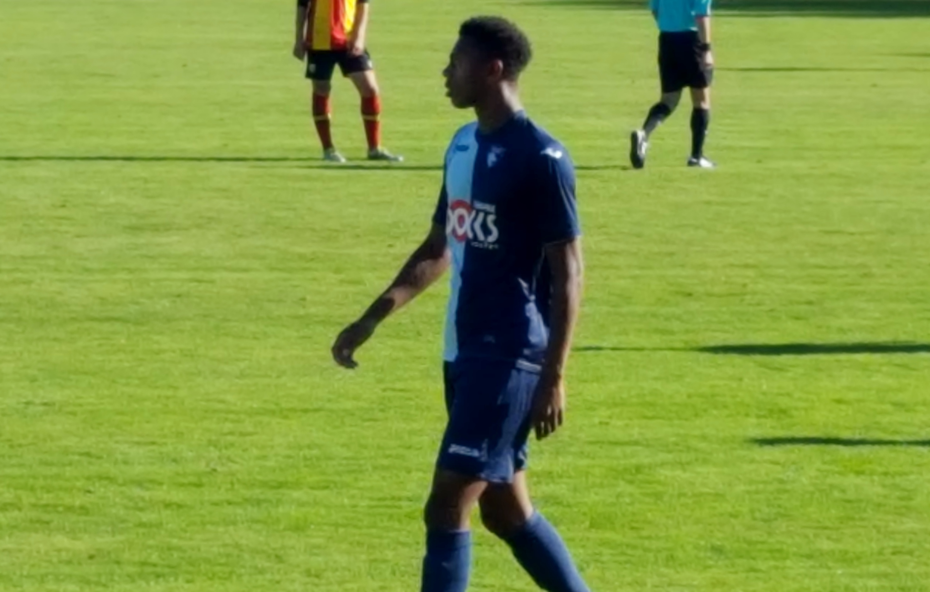 Nathaël Julan lors du match RC Lens B / Le Havre B, comptant pour la première journée du Championnat de France de football amateur (CFA) 2016-2017, le13 août 2016, au Stade François Blin d'Avion.